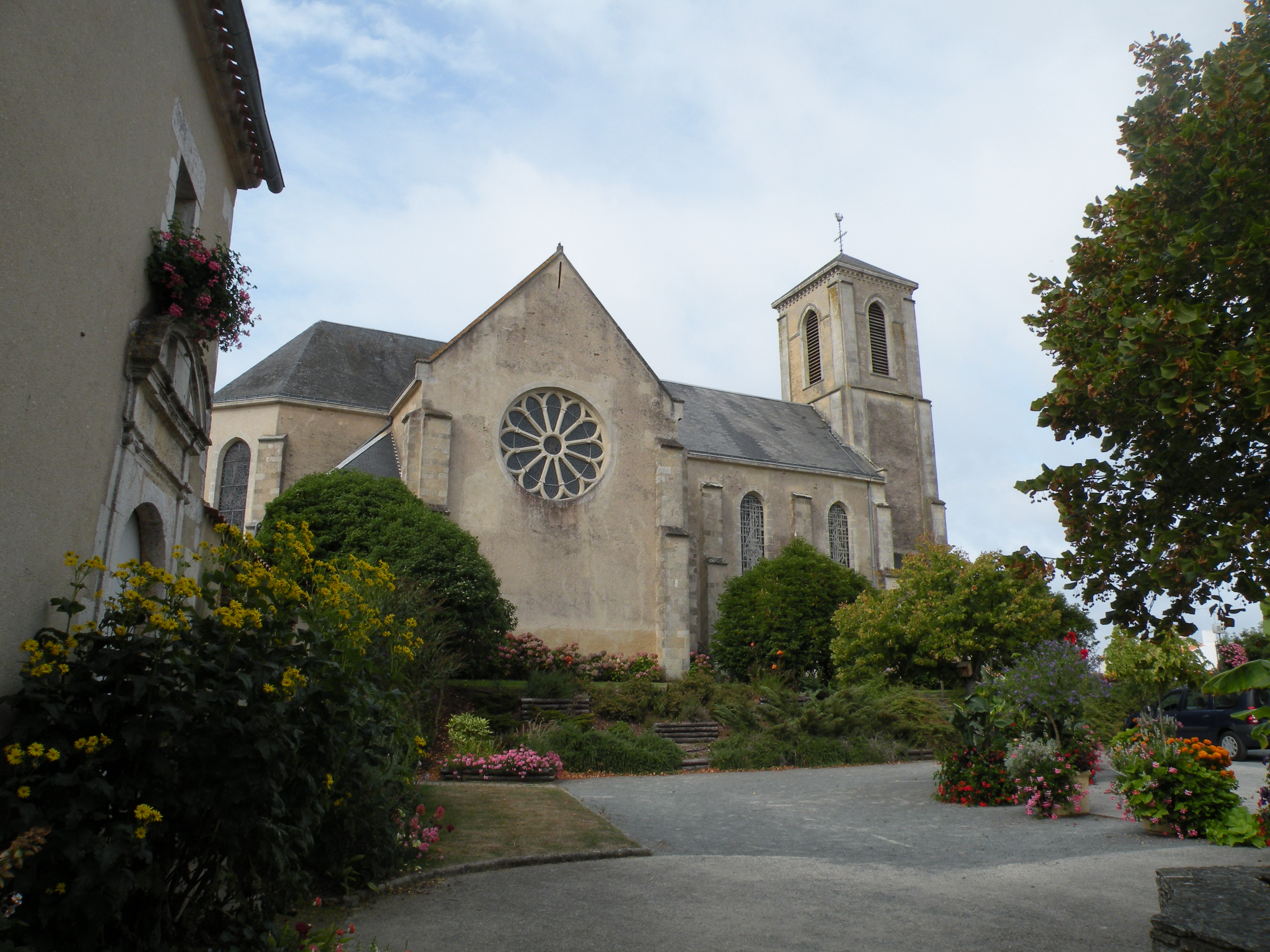 eglise de givrand, vendée, france